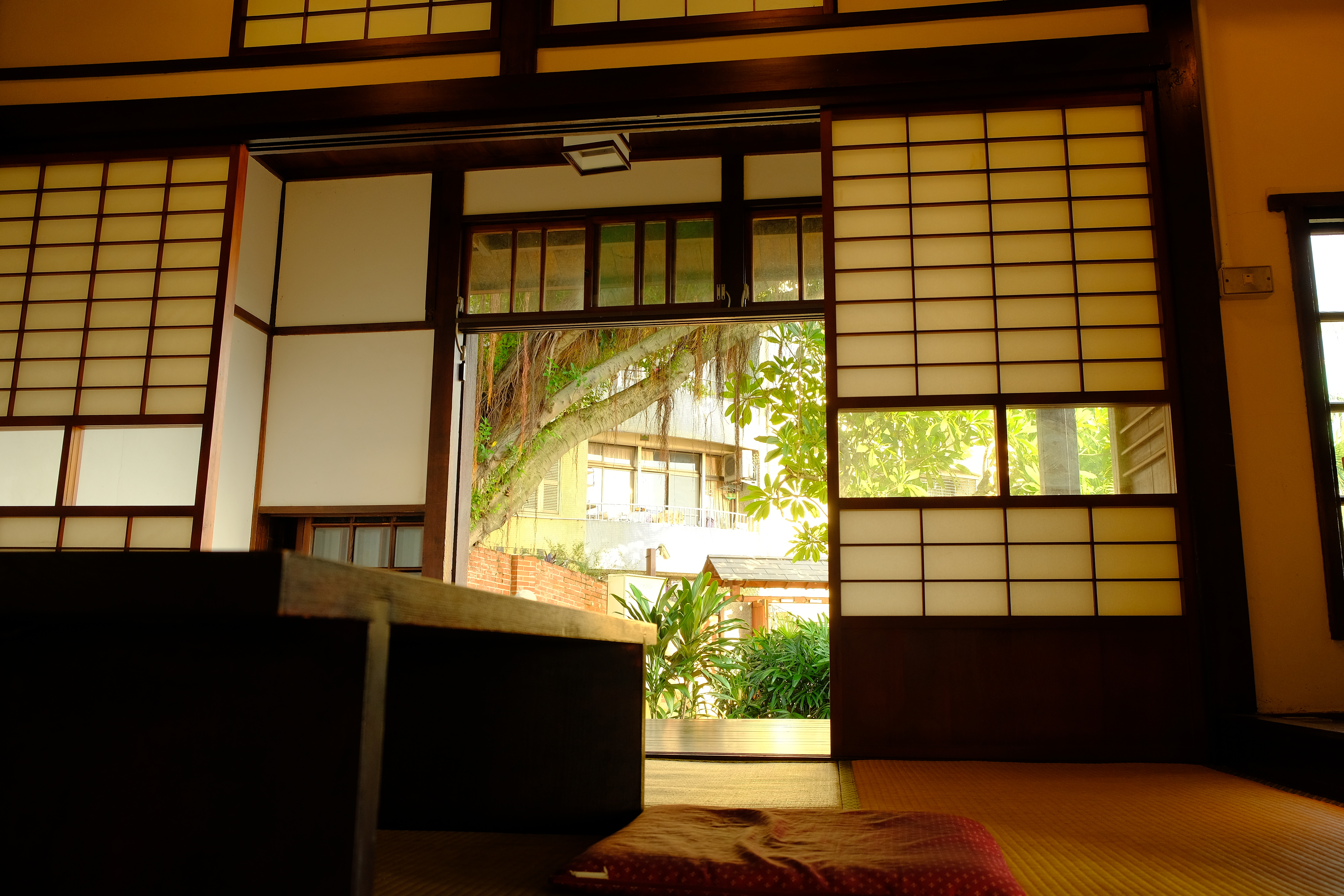 中文（台灣）: 2019 Tamsui TaDa Eikichi House 多田栄吉故居